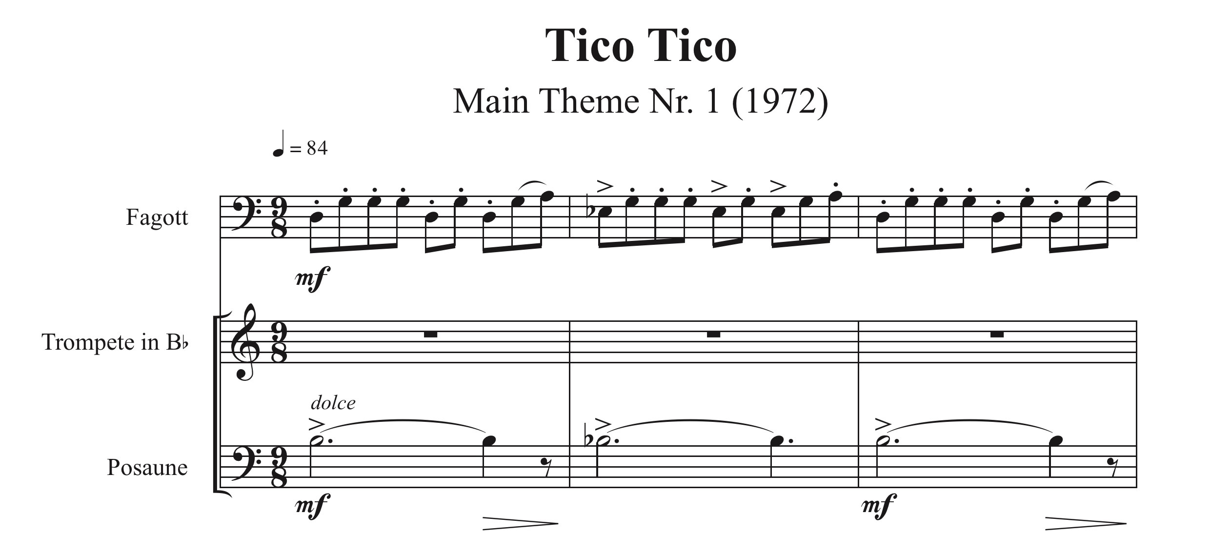 Tico Tico Le Thema für Fagott, Trompete und Posaune oder Wind-Quintett ist 1972 entstanden. Hier ein Auszug.